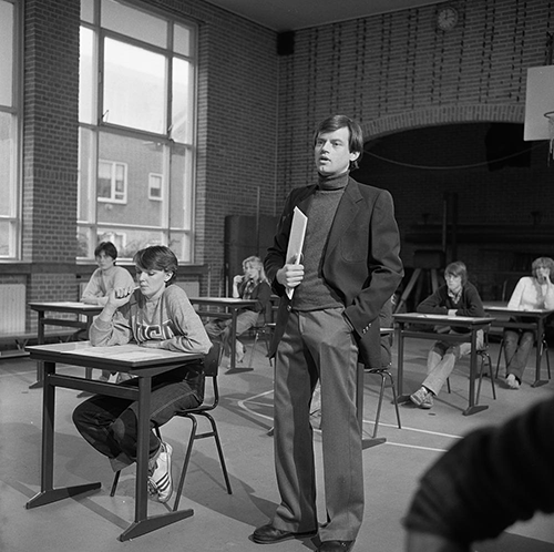 Frederik de Groot in aflevering Het eindexamen van de Nederlandse dramaserie De Lemmings in 1980